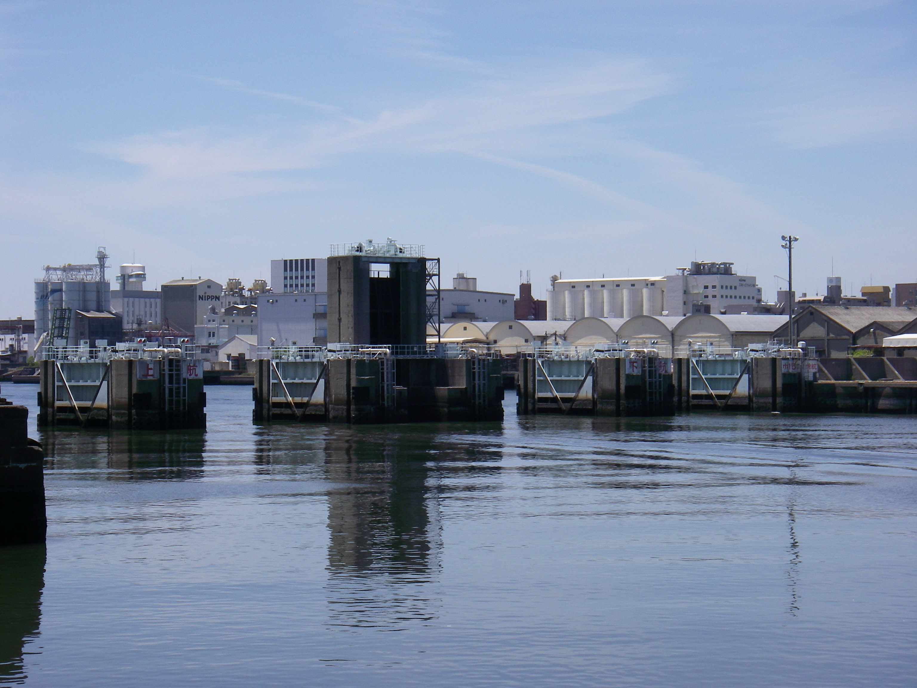 堀川口防潮水門（愛知県名古屋市港区）